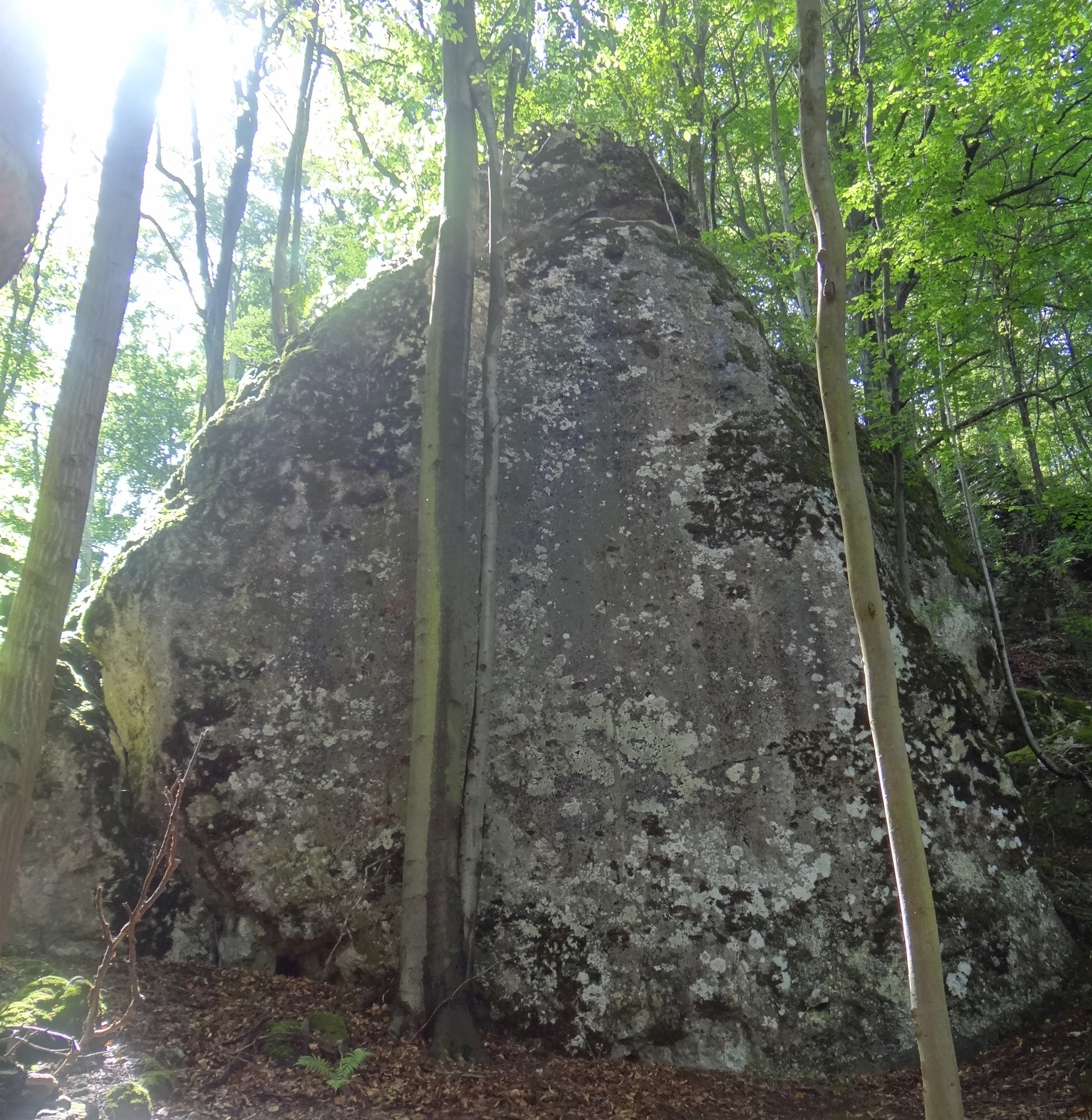 Skała Piramida w grupie Skał Kroczyckich naWyżynie Częstochowskiej